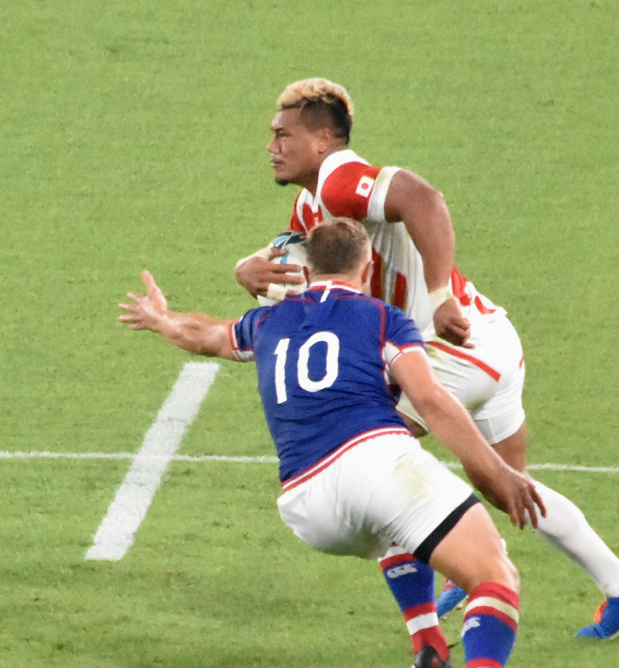 レメキロマノラヴァ